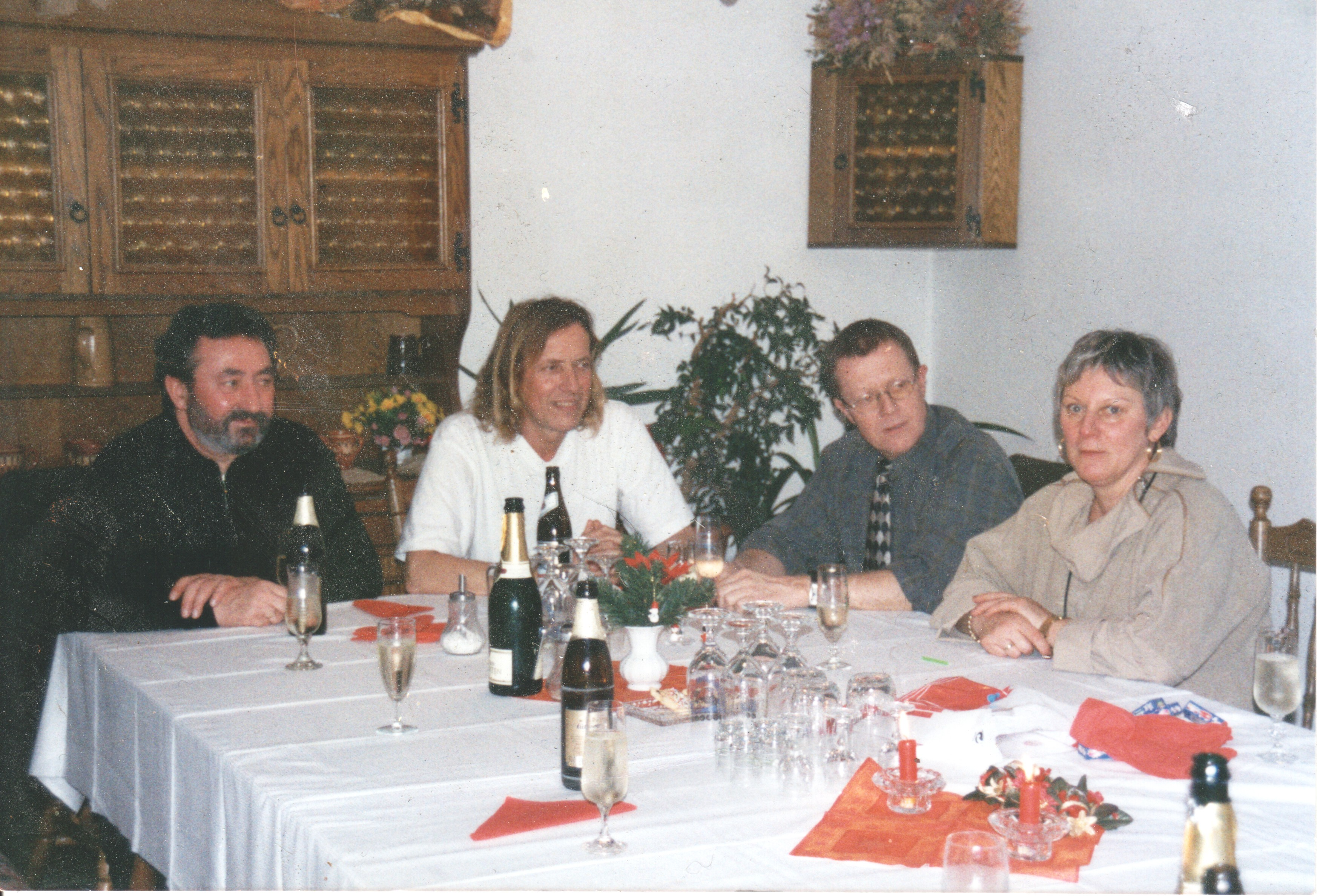 Peter Gläser bei einer Feier seines Bruders! Er spielte für die Kinder auf der Feier auf seiner Querflöte!